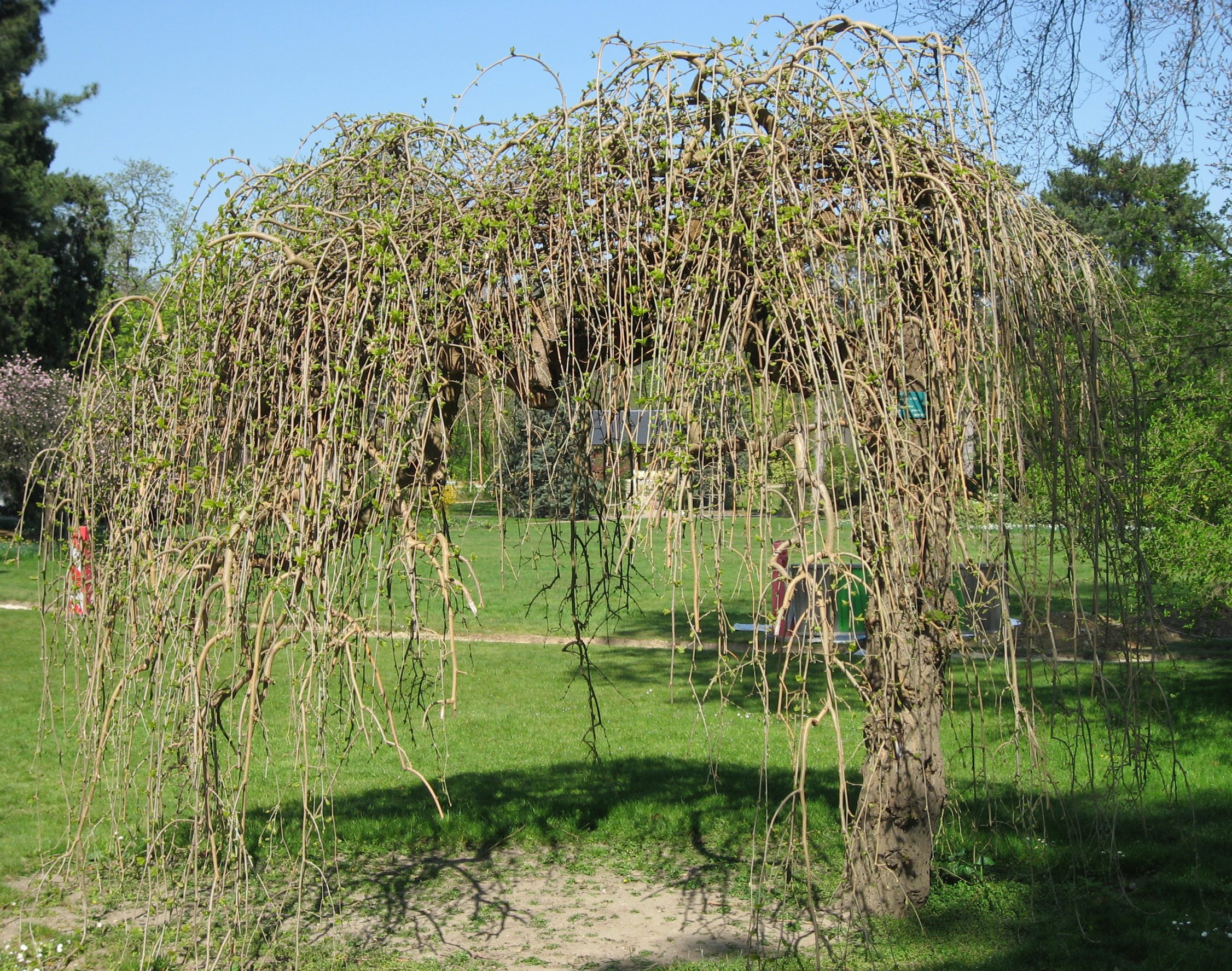 Morus alba in Jardin du Pré-Catelan Map: 48° 51' 52" N 2° 15' 13" E